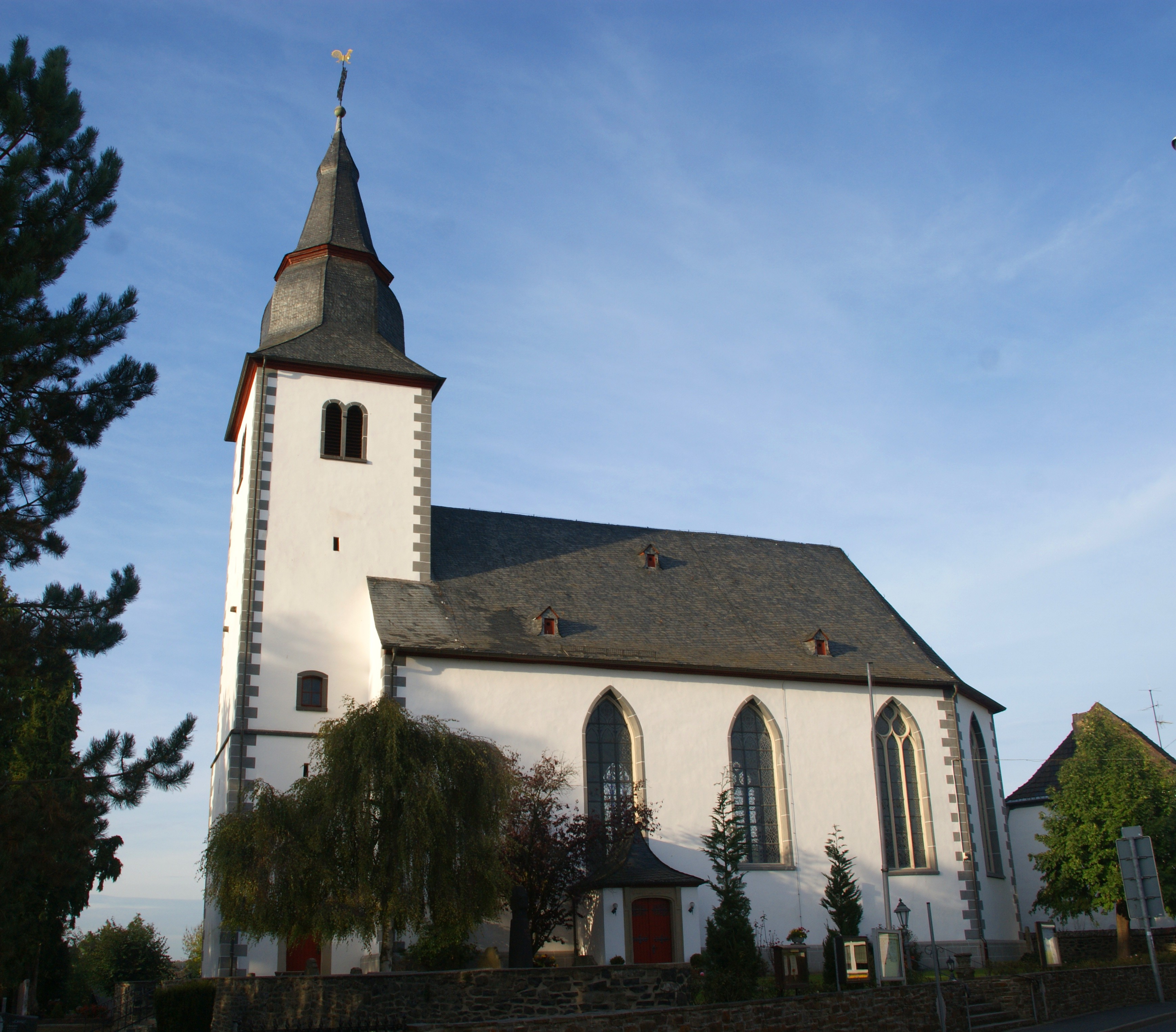 Katholische Kirche St. Simon und Judas Thaddäus Wachtberg-Villip